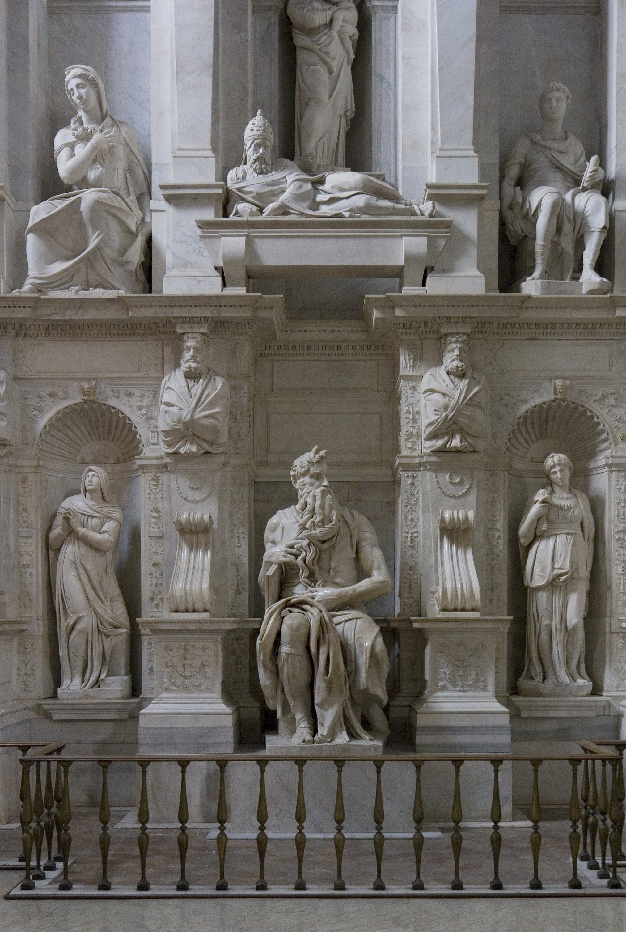 Die berühmte Statue des Moses von Michelangelo in einer Teilansicht des Grabmonuments.